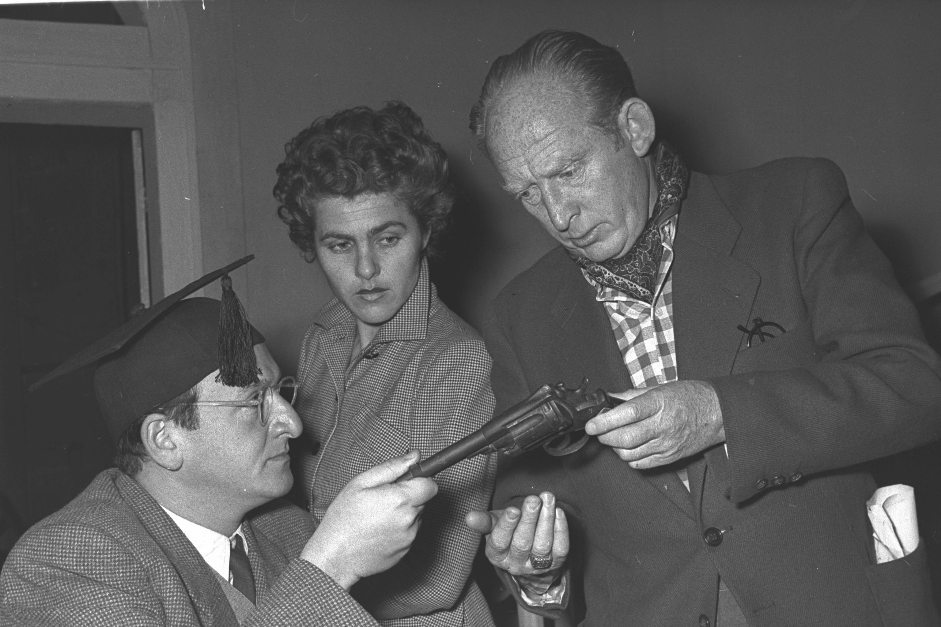 שחקני תאטרון הבימה רפאל קלצ'קין (מימין), שושנה רביד פרידמן ושרגא פרידמן.